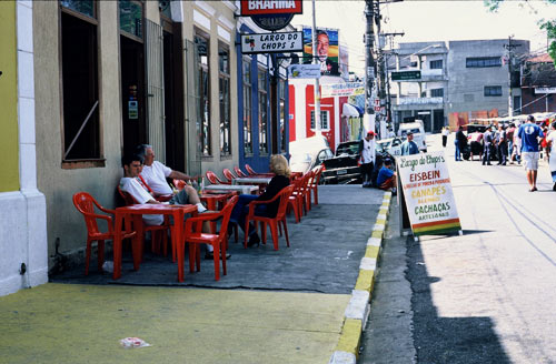 Outros casarões que se localizam ao lado da Igreja Matriz, e que também abrigam restaurantes e bares especializados